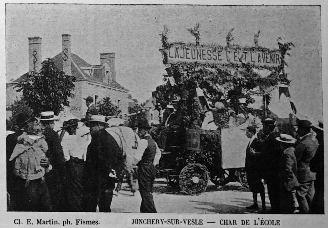 publié dans le "Bulletin de l'œuvre des voyages scolaires".